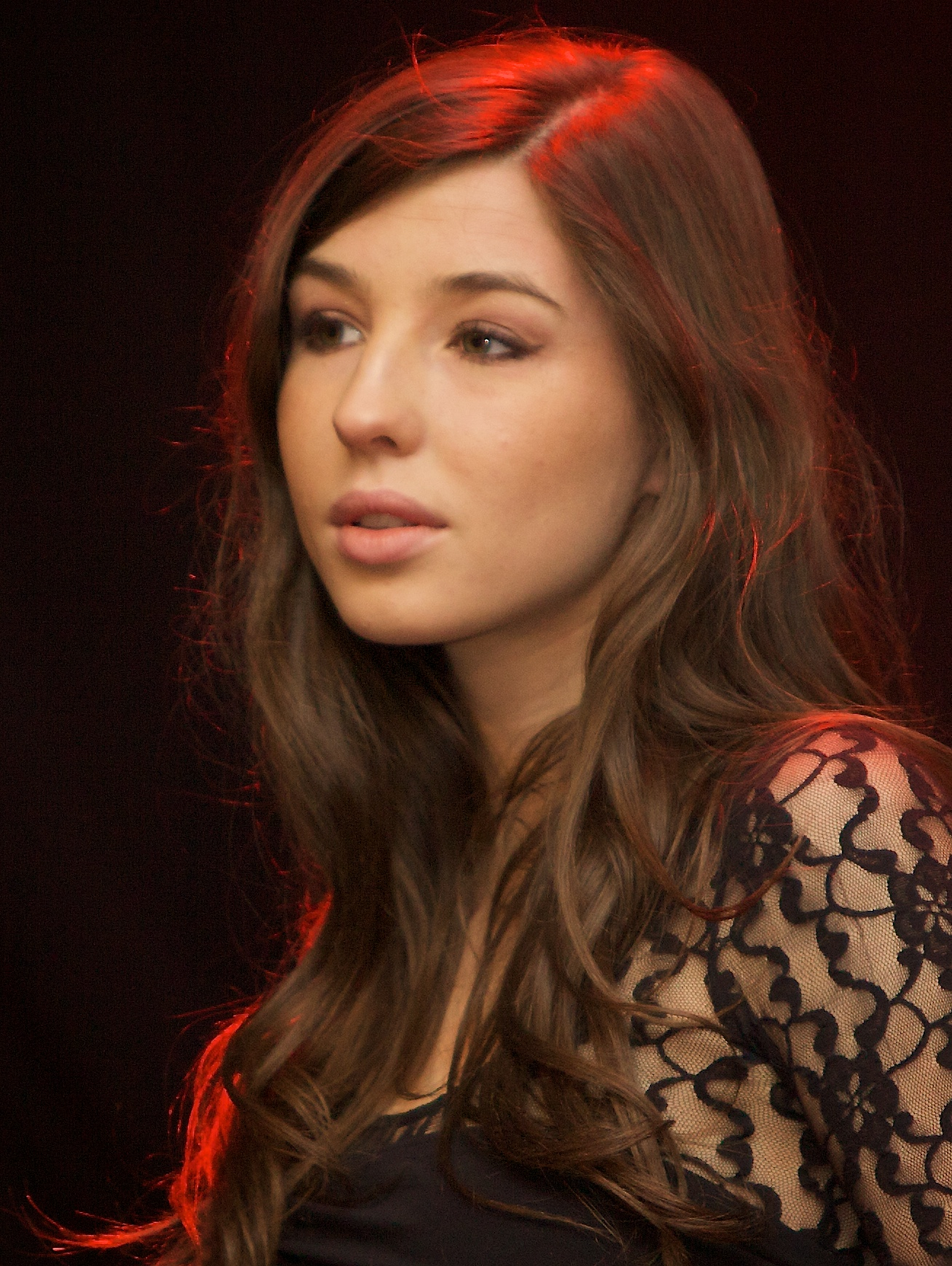 Linnea Dale